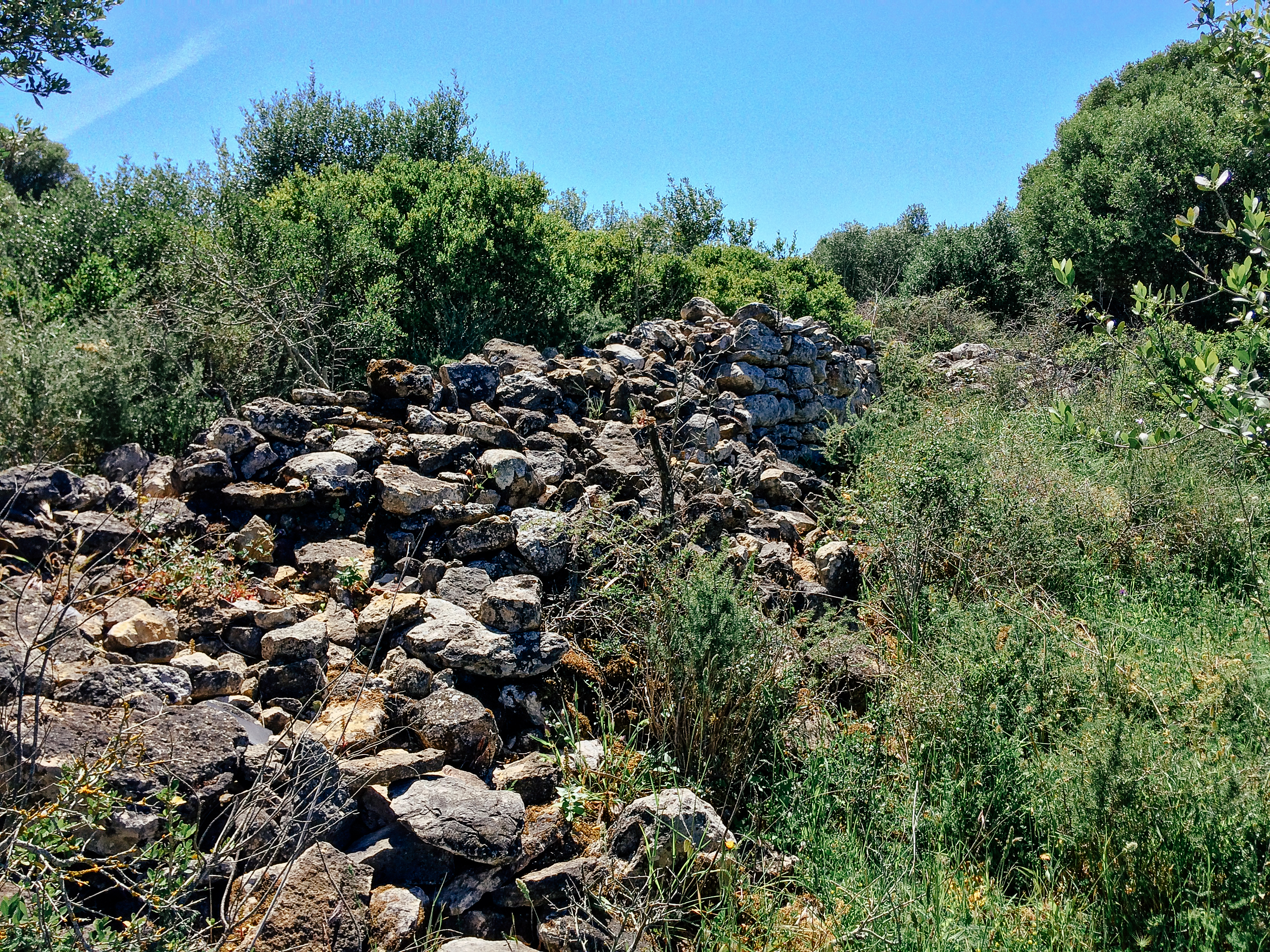 Aspeto da zona onde se implanta a villa romana.